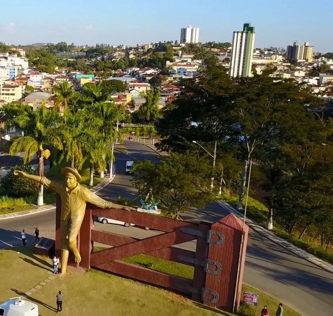 Monumento em Ouro Fino